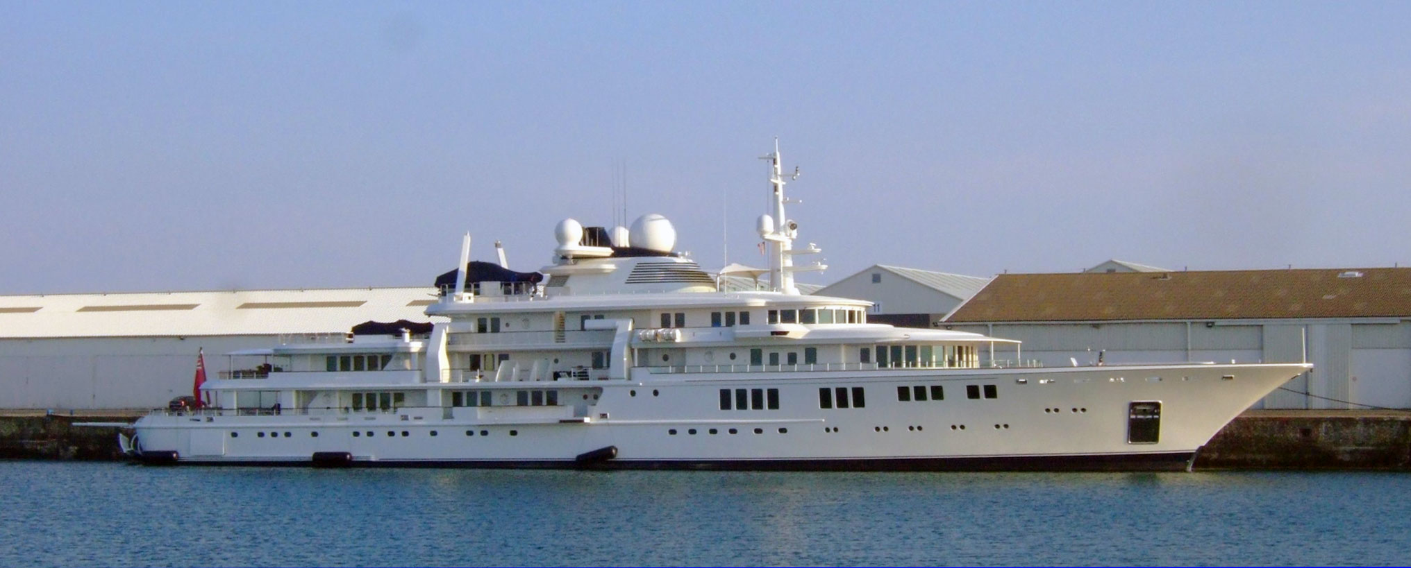 Le Tatoosh dans le port de commerce de La Pallice, La Rochelle, France IMO Number : 1006336 MMSI Number : 319801000 Callsign : ZCIF8 Length : 92 m Beam : 15 m